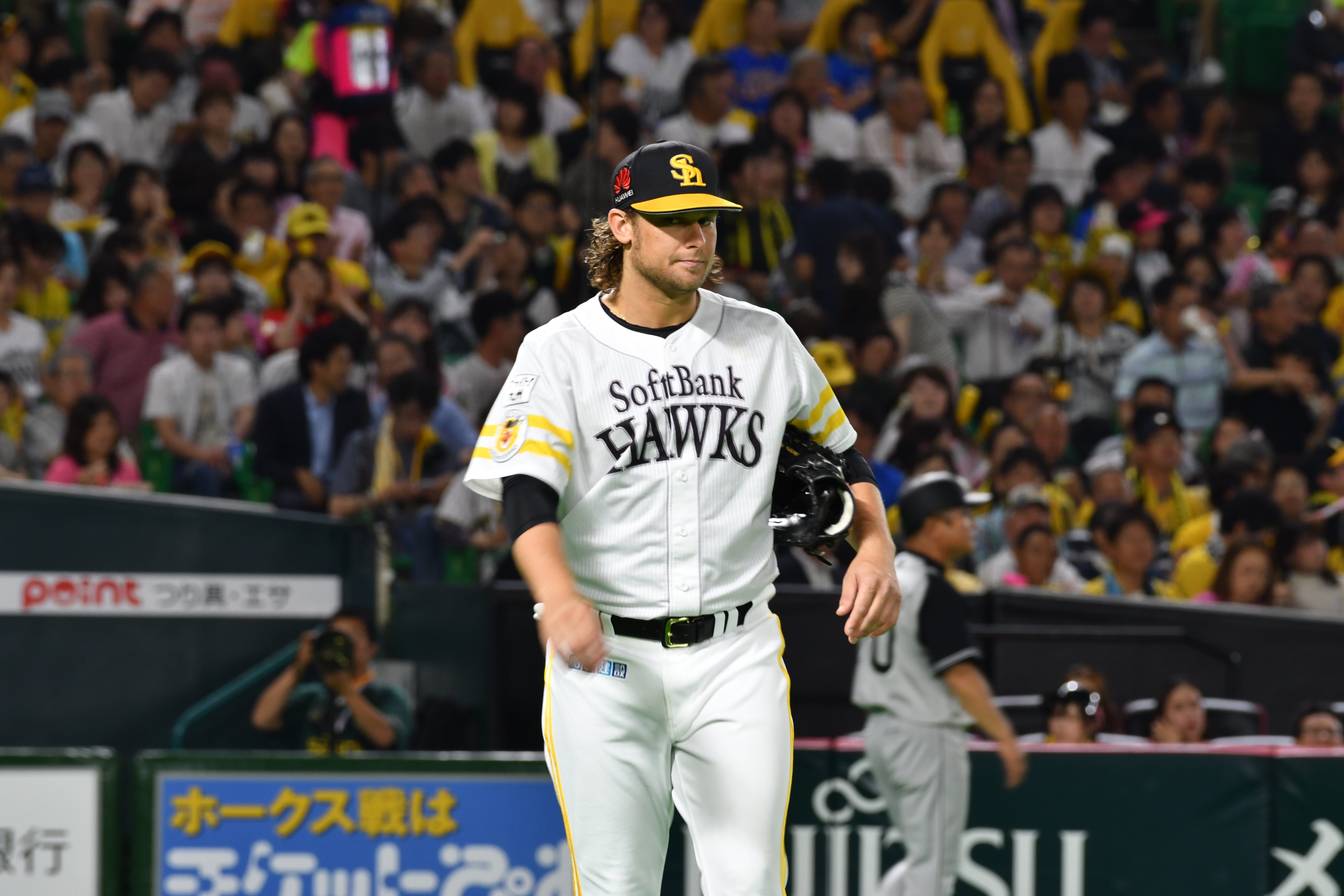 カイル・グレゴリー・ジェンセン（Kyle Gregory Jensen ）アメリカ合衆国・カリフォルニア州コントラコスタ郡ウォールナットクリーク出身。福岡ソフトバンクホークス所属の内野手